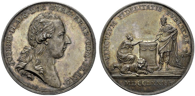 Joseph II.: Silbermedaille auf die Huldigung der Niederlande (1781), von Berckel. Revers: Belgia huldigt dem Kaiser.